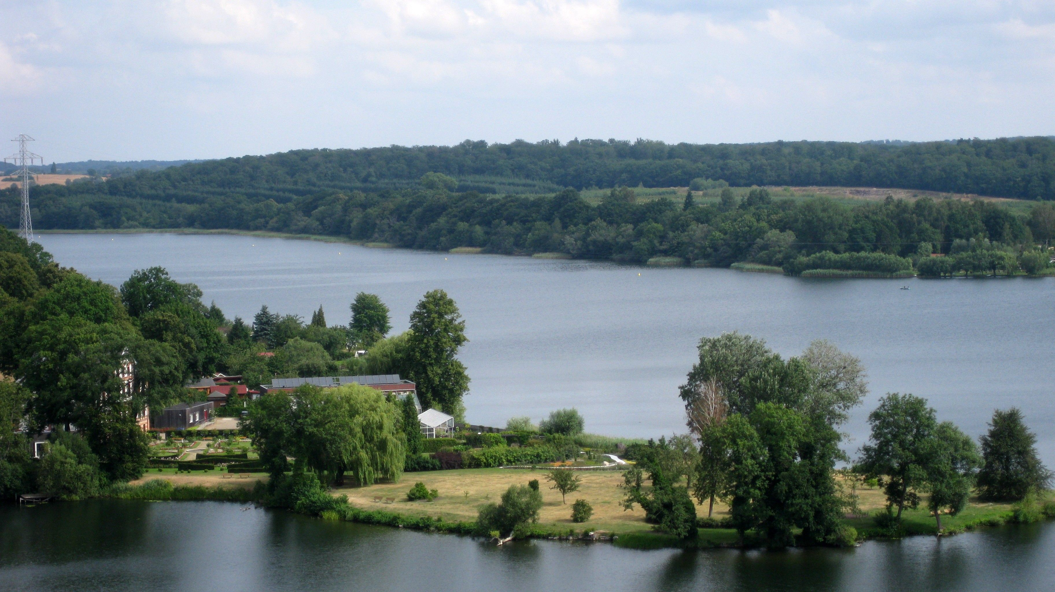 Blick auf den Tiefwarensee vom Kirchturm der Marienkirche in Waren (Müritz)